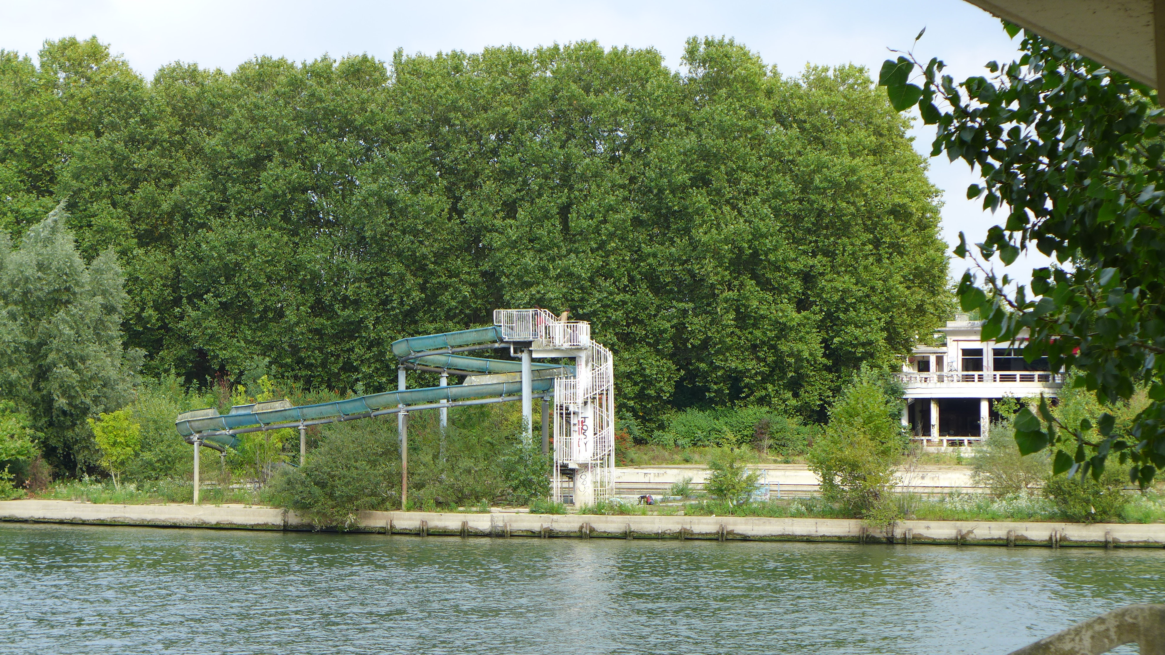 Plage de Villennes